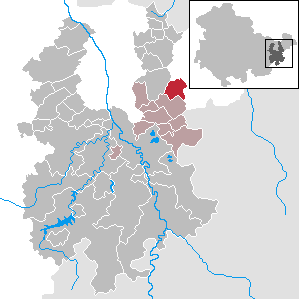 Paitzdorf in Thuringia - District Greiz